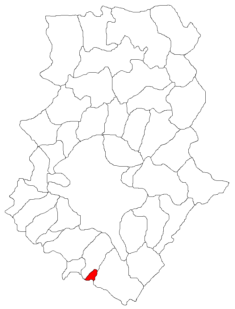 Categorie:Hărţi ale judeţului Ilfov